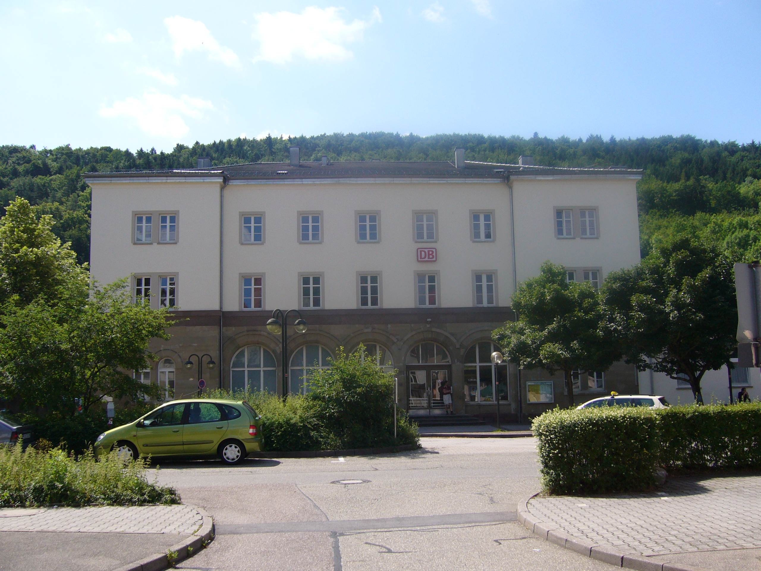 Bahnhof von Horb am Neckar.